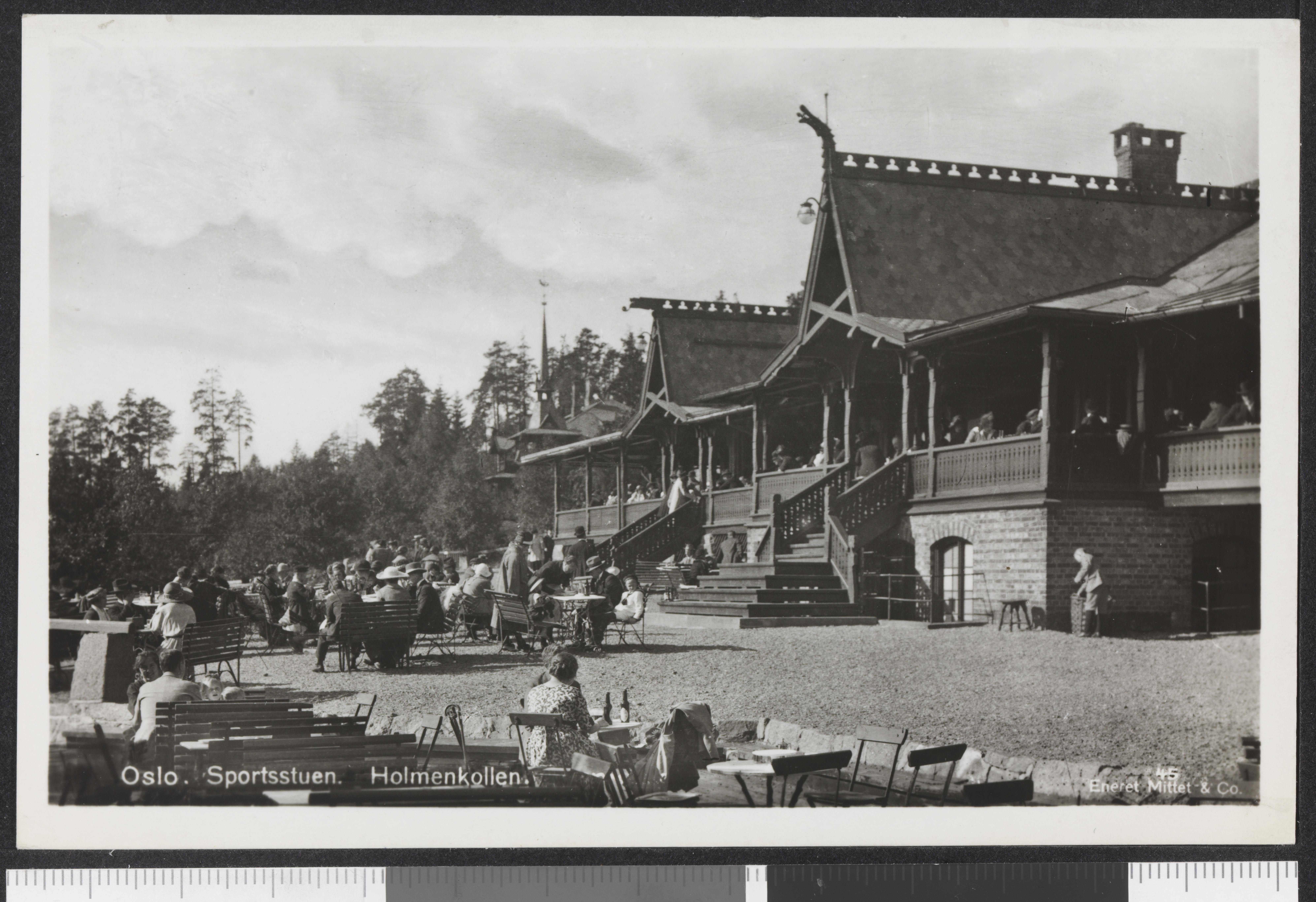 Bildet er hentet fra Nasjonalbibliotekets bildesamling Holmenkollen resturant,Holmenkollen sportstue, Oslo, Oslo